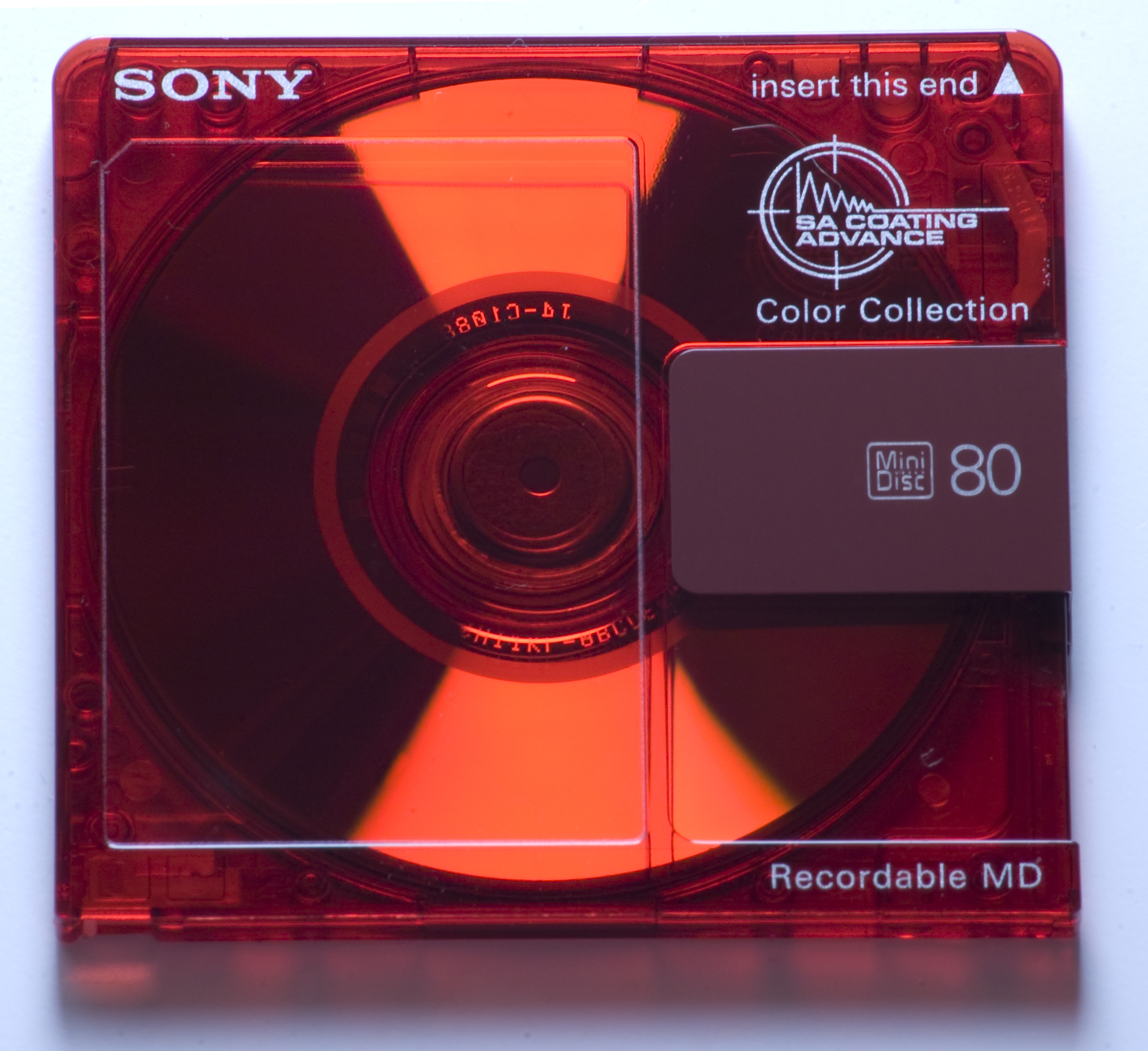 Eine andere Verion der Sony MiniDisk